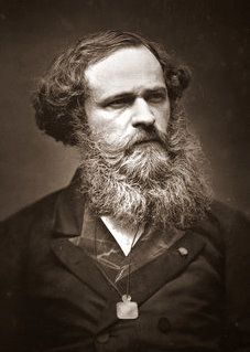 Arsène Houssaye (1815-1896)